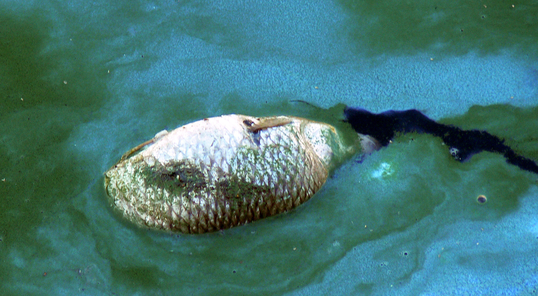 Poisson mort, au milieu d'une zone d'accumulation en surface de plancton a priori constituée de cyanophycées (autrefois classées comme "algue bleue"). Dans ce cas, quelques heures (ici une quinzaine d'heure) après le début de l'épisode d'inflorescence, après une phase de "verdissement", des taches bleues se sont étendues et accumulées sur les bords d'une pièce d'eau (bras d'ancien canal, aujourd'hui fermé)La couleur bleue caractérise des zones d'accumulation de pigments bleus libérés par des bacéries mortes. Ici l'eau a une consistance de «soupe» sur les 5 à 10 mm, sous la surface. Lieu : Quai du Vault à Lille (France), non loin du centre ville, après une longue période pluvieuse (non caniculaire, et même sous les moyennes saisonnières, mais avec des nuits inhabituellement douces). Le canal proche (Deûle) est également couvert d’une couche de plancton vert sur de vastes surfaces (centaines de mètres carrés), mais beaucoup moins épaisse. Les échantillons dégagent une forte odeur d'algue (type spiruline).